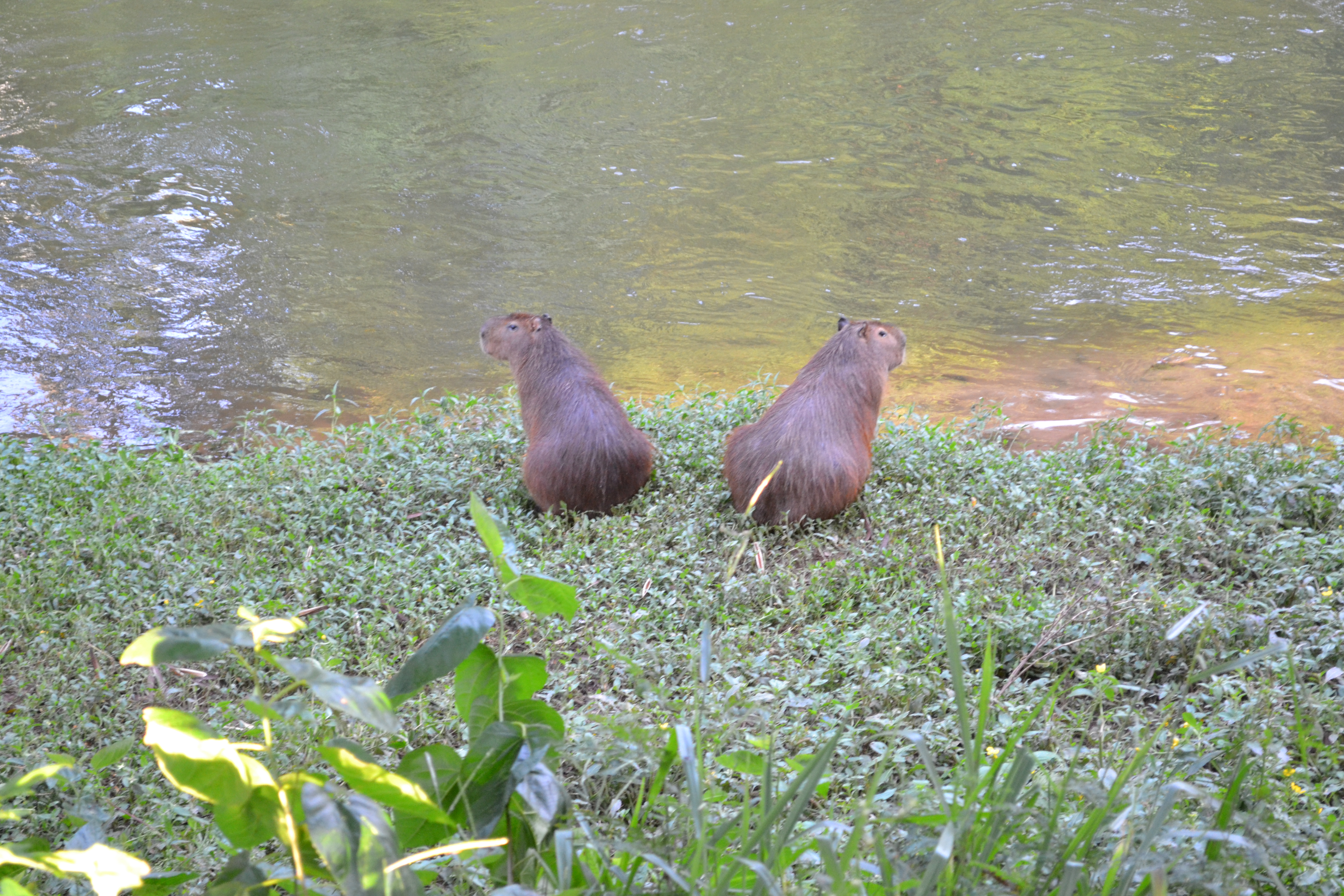 Grupo de capivaras na beira do Rio Sorocaba, perto da Ponte Benito Sevilha (Votorantim)